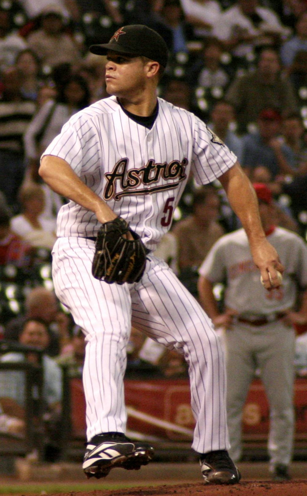 Wandy Rodríguez